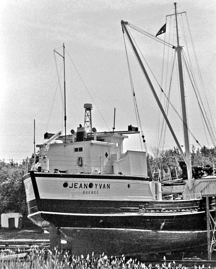 goélette (schooner) du Saint-Laurent "Jean-Yvan" - auteur Robert Desjardins pour le site